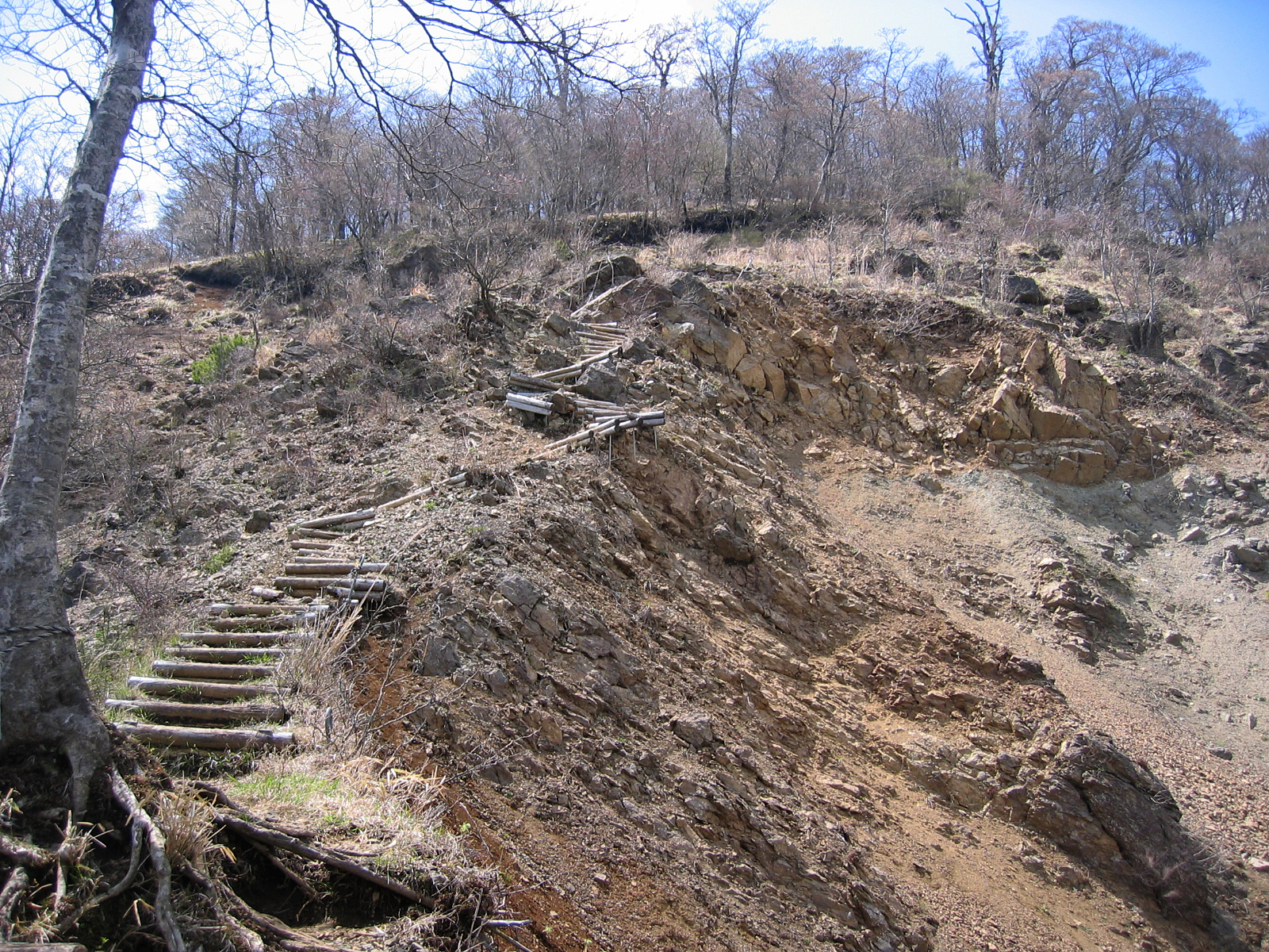 丹沢・天王寺尾根のガレ場。